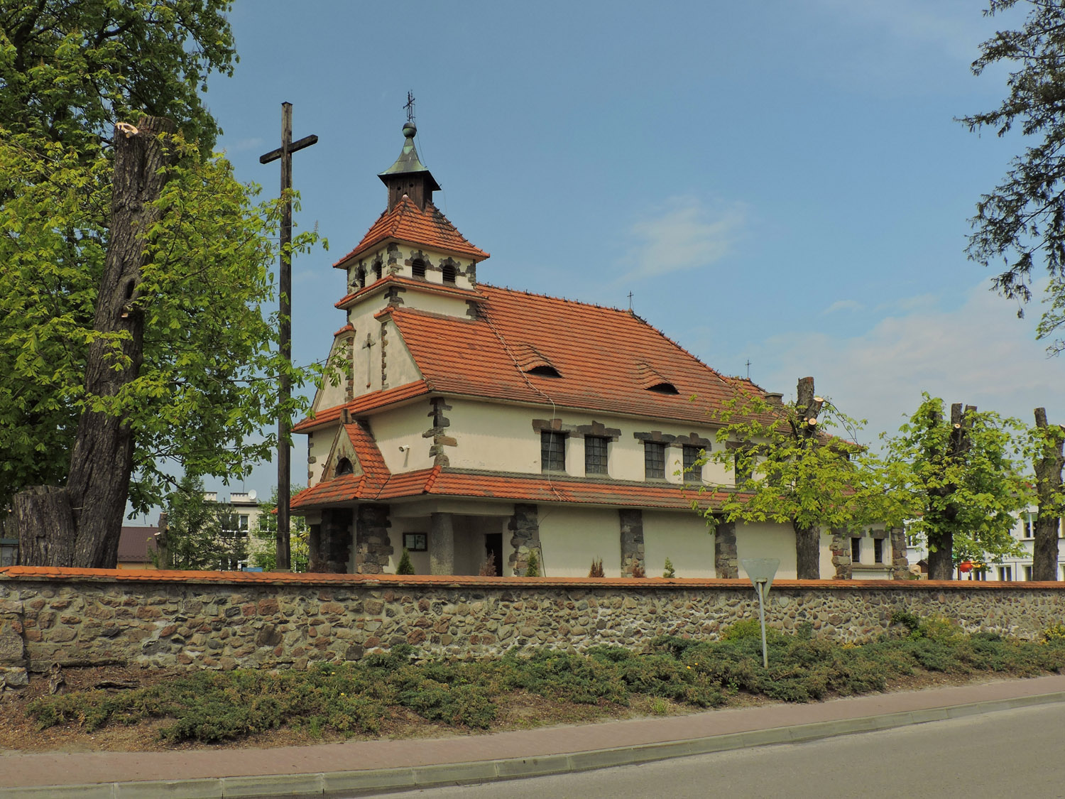 Błędów, kościół fil. pw. św. Prokopa Opata, 1935-1938